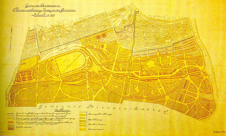 H. P. Berlage, Plan van uitbreiding zuidzijde der gemeente, 1904 Publiek domijn uit het Coll. Gemeentearchief Amsterdam.